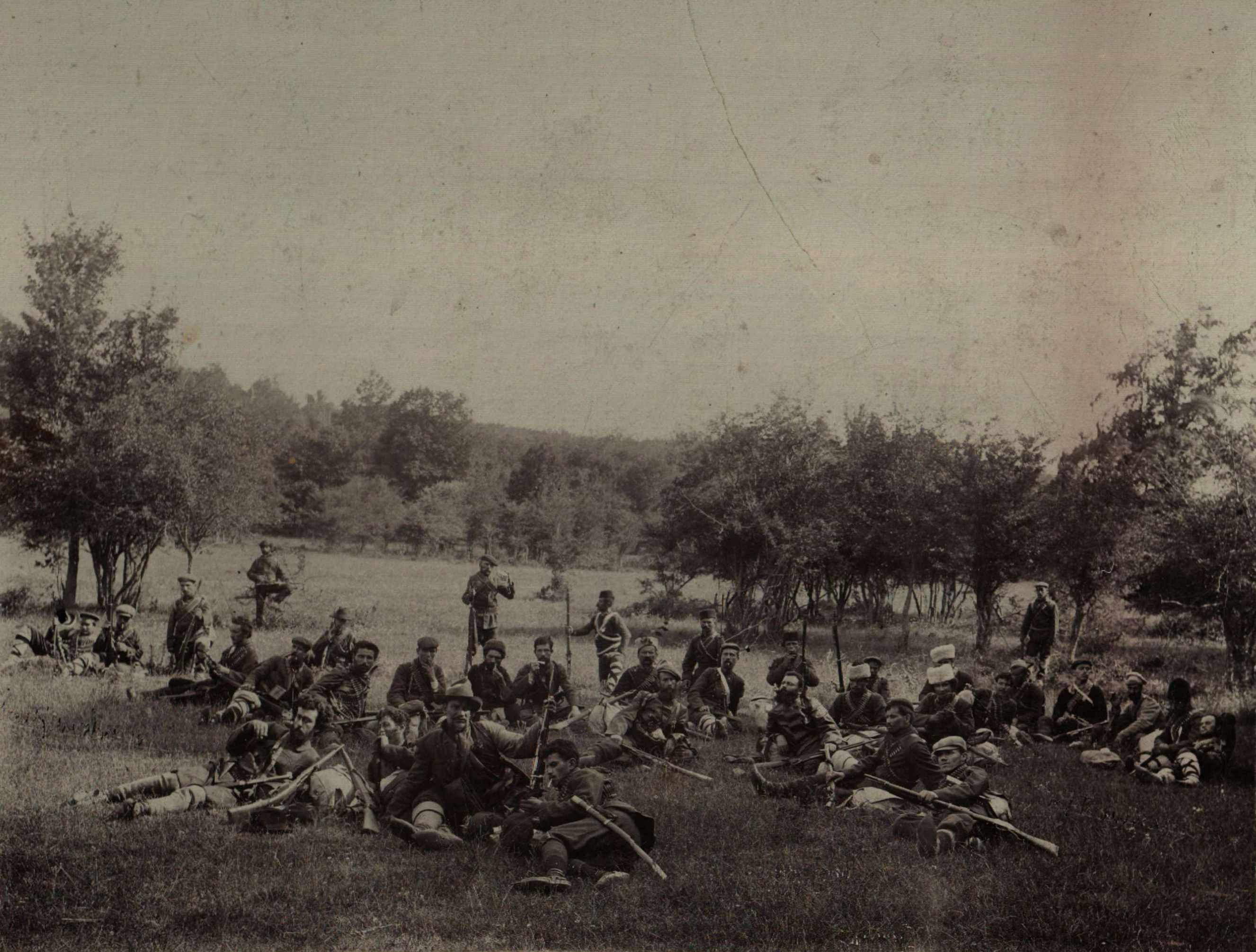 Въстанници и делегати при Алан кайряк. От ляво на дясно: I ред полегнали: Михаил Даев, Кръстьо Българията, Константин Калканджиев и Христо Караманджуков; II ред полегнали и седнали: Тодор Станков над Даев, Никола Славейков, Янко Стоянов и баща му Стоян кехая Петров, Спас Цветков с цигара на уста, Велко Думев, един фелдфебел, Васил Пасков, Георги Василев, Димитър Катерински с пушката над коленете, зад последните двама Сава Киров, Георги Хаджиатанасов, Димитър Аянов, тримата от края неизевестни (единият е войник на границата); III ред полегнали, седнали и прави: Димитър Янев, двама неизвестни, Анастас Разбойников (до Тодор Станков) чисти револвера си, зад него на един крак Димо Янков, Минко Неволин (зад Тодор Станков и Никола Славейков, руснак (правият зад Стоян кехая Петров), останалите 9 са неизвестни.